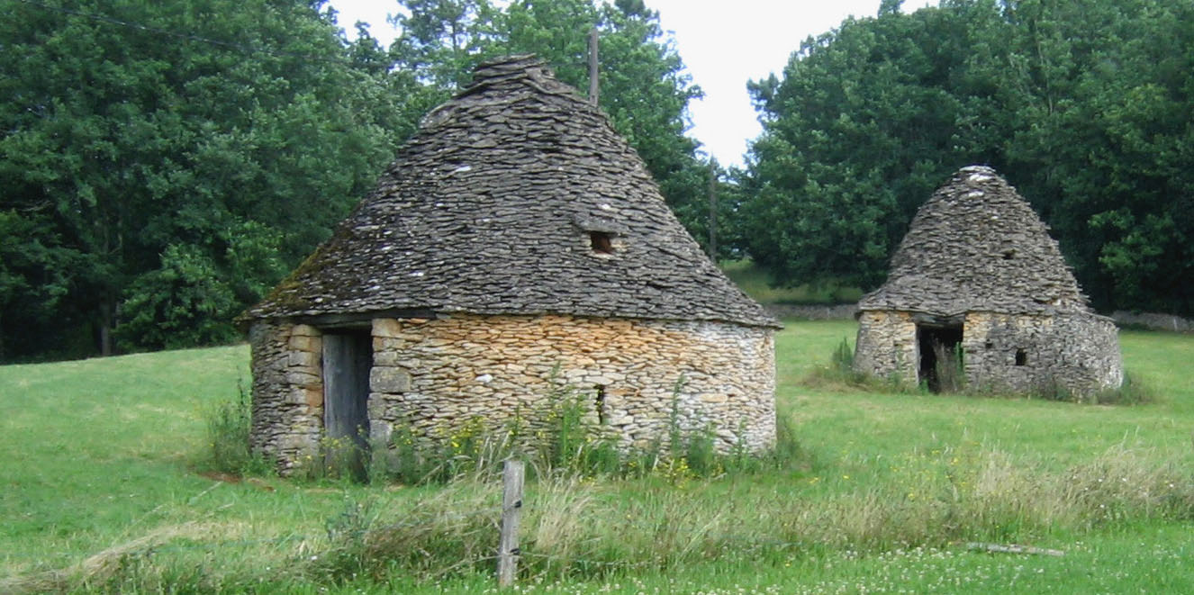 Cabanes en pierre sèche, Meyrals (24220), lieu-dit : Boyer, Dordogne, France